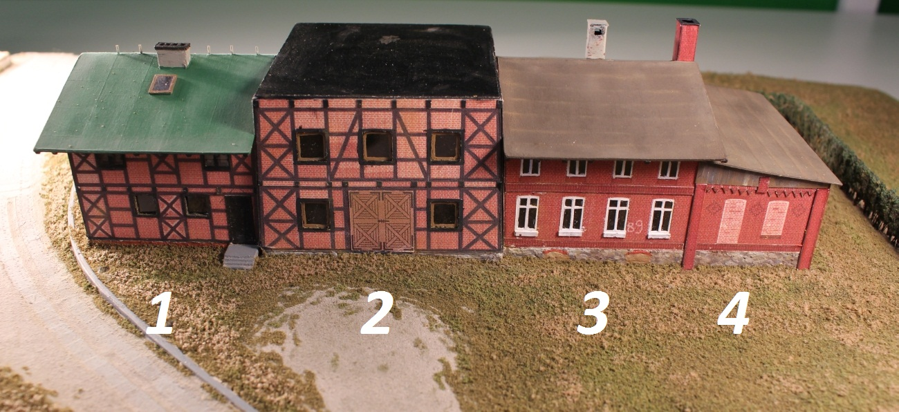 Wiatrak w Wikrowie: 1 Budynek zaplecza i magazynu 2 Hala maszyn młyńskich - podstawa wiatraka 3 Budynek gospody 4 Budynek świetlicy